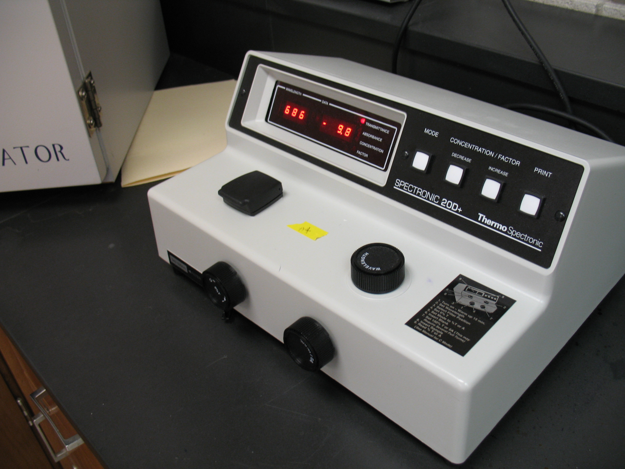 Typowy spektrofotometr